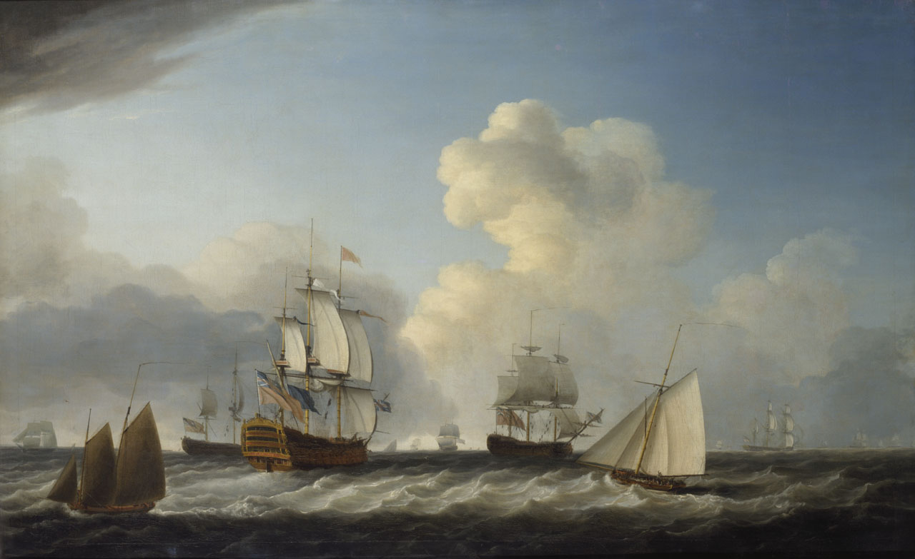 Le HMS Saint-George, portant le pavillon d'un vice-amiral de l'escadre rouge, accompagnés d'autres vaisseaux, par Dominic Serres. Peinture de 1787.